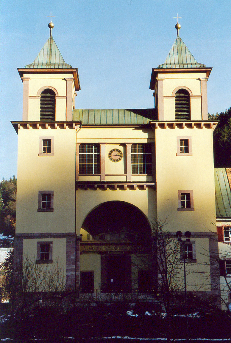 Die Bad Rippoldsauer Wallfahrts- und Pfarrkirche im Weinbrenner-Stil, erbaut 1829 durch Christoph Arnold.